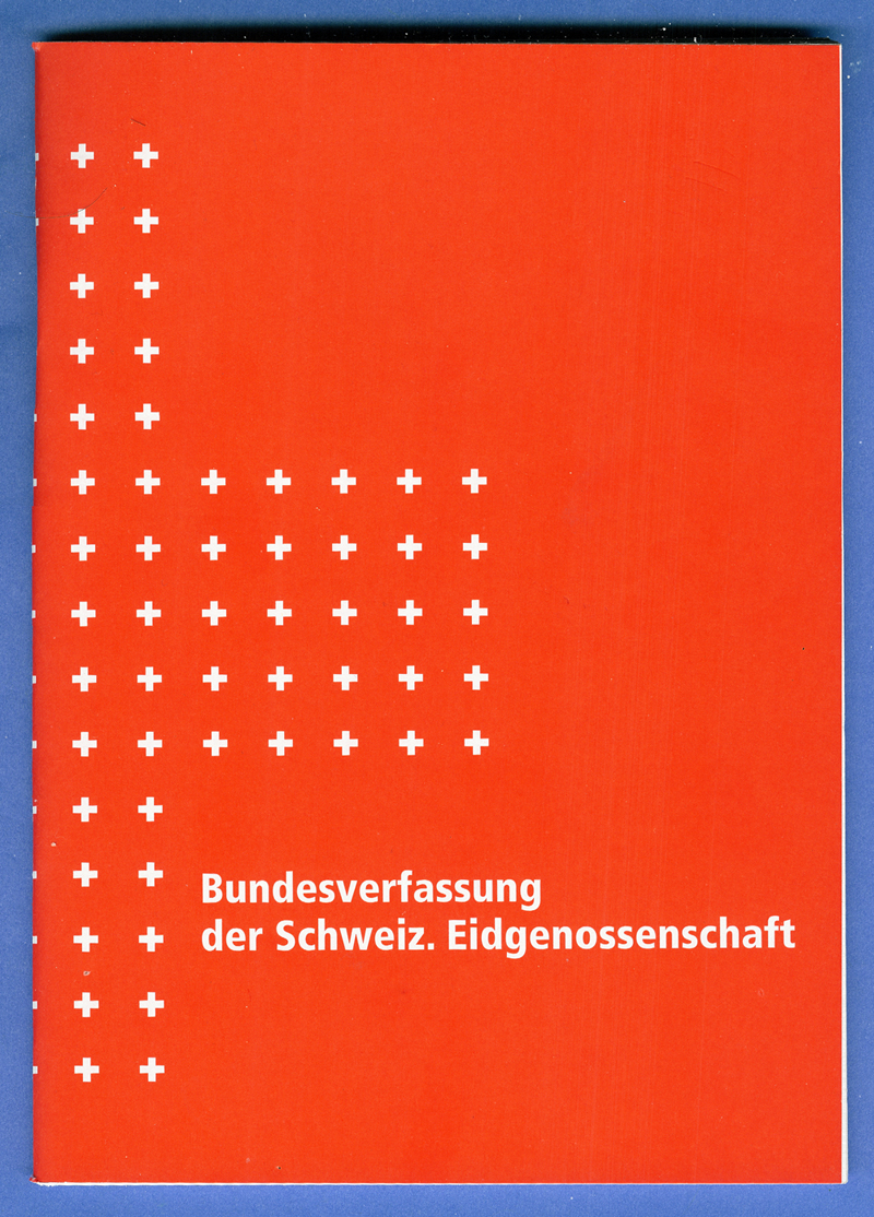 Bundesverfassung Schweiz, auf blauen Untergrund